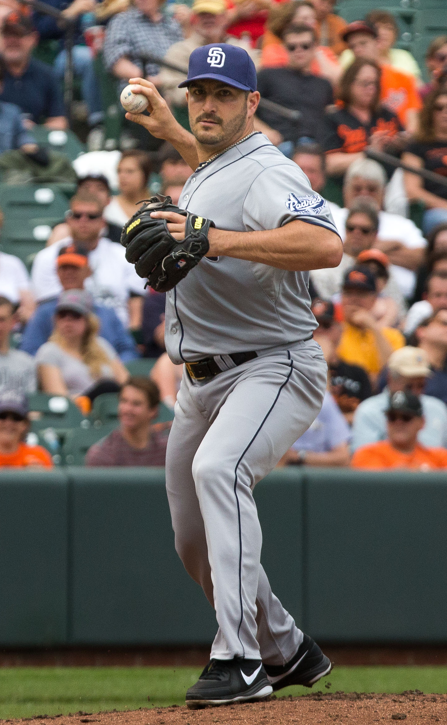 Jason Marquis